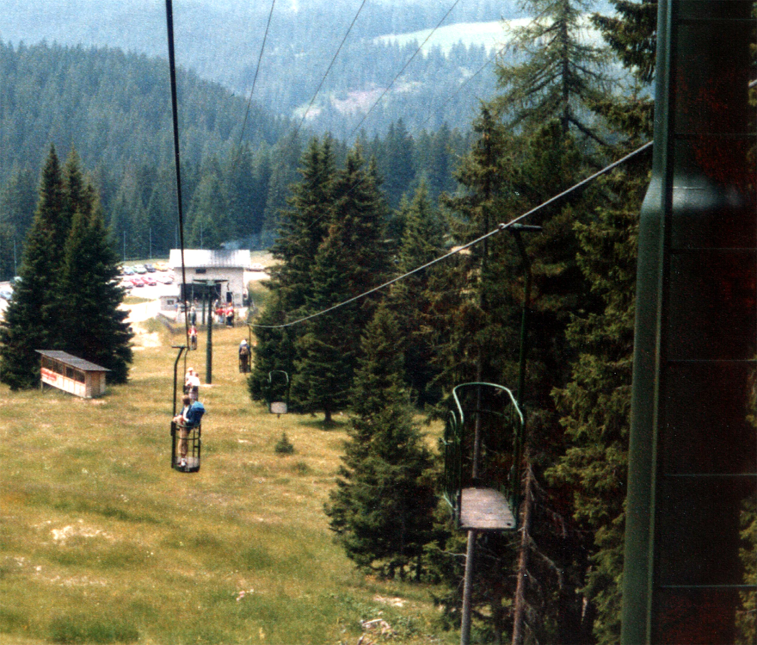 Korblift vom Karerpass zur Rosengartenhütte (Alte Kölner Hütte, Rif. Fronza alle Coronelle)